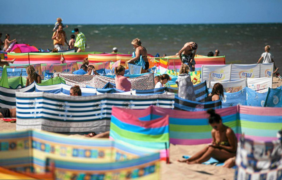 Использование пляжного паравана для защиты от ветра на берегу моря